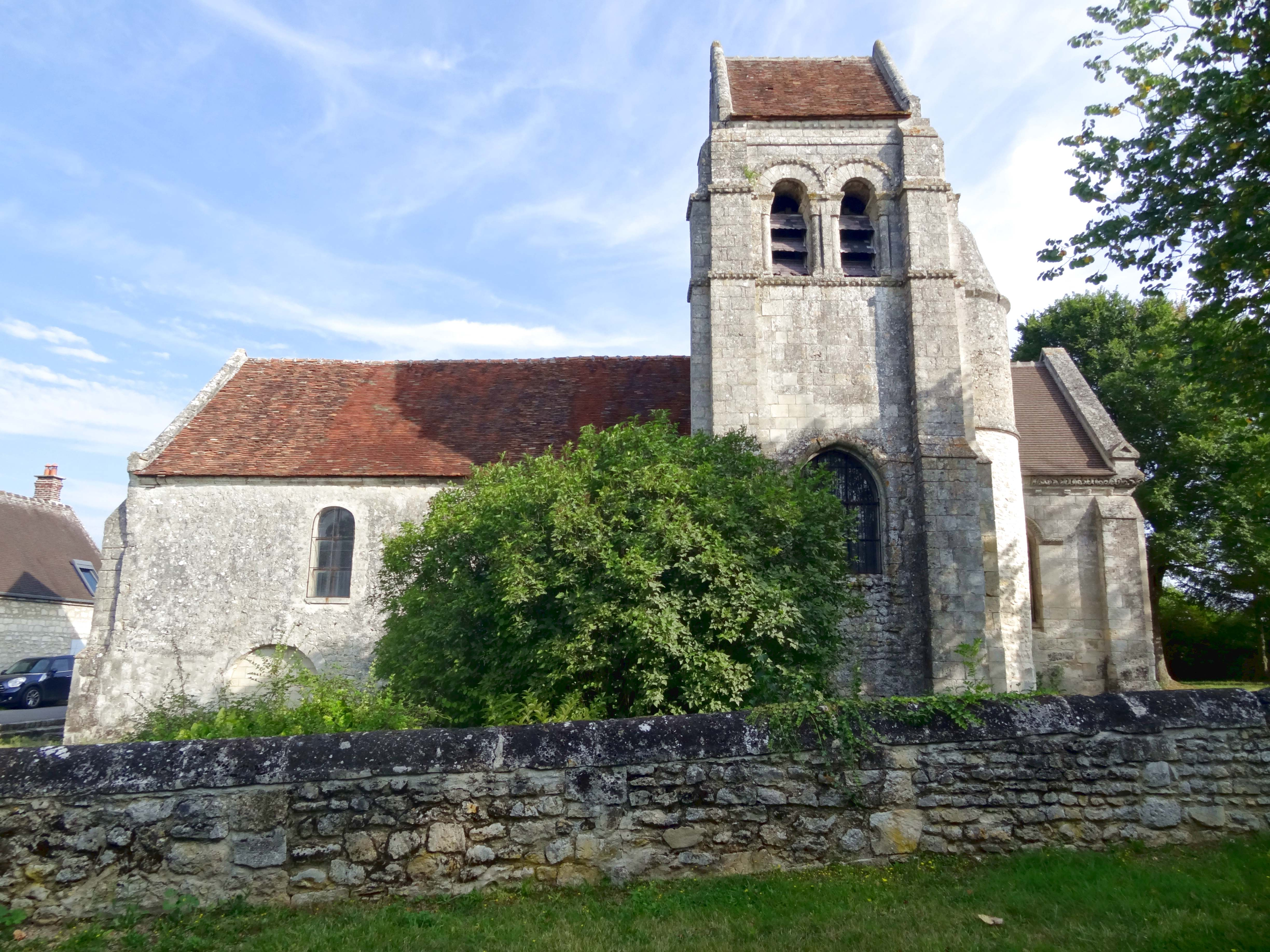 Église Saint-Martin de Noël-Saint-Martin - voir titre.